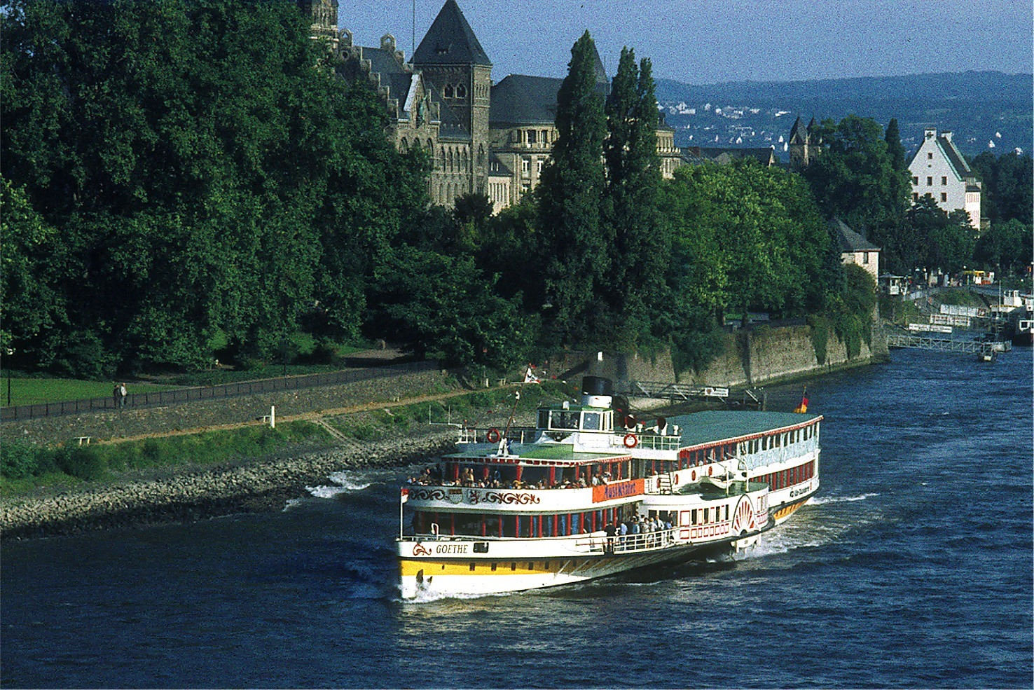 Schaufelraddampfer Goethe in Koblenz